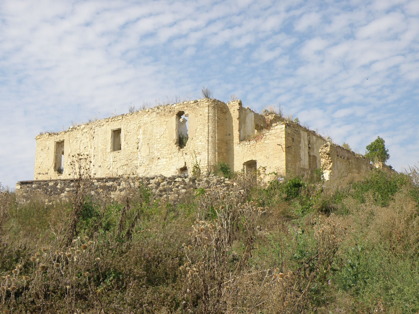 Zámek, částečná zřícenina Libčeves, Libčeves